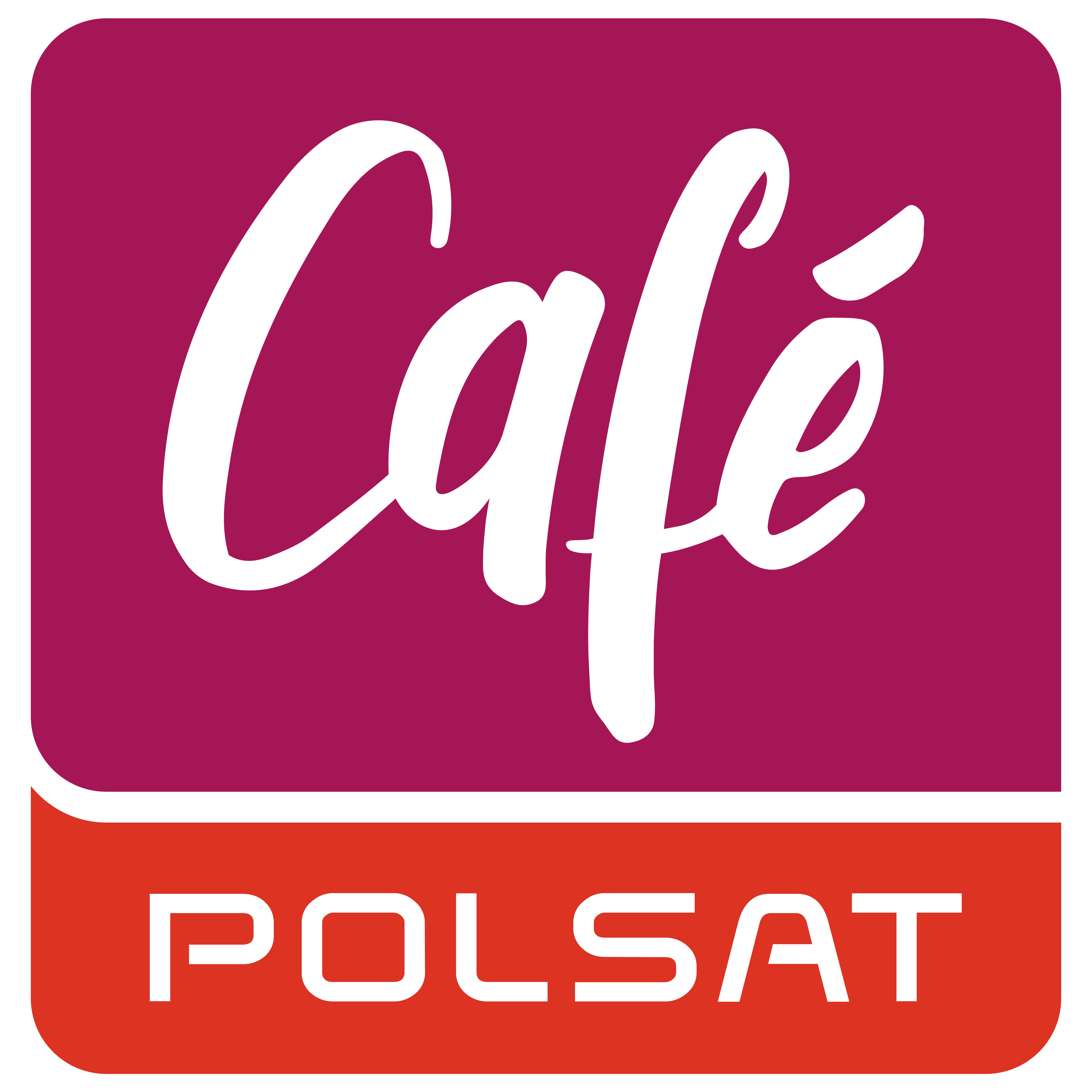 W nowym logotypie zrezygnowano z odcieni ponurej szarości i czerwieni na cześć aksamitnej czerwieni i różu